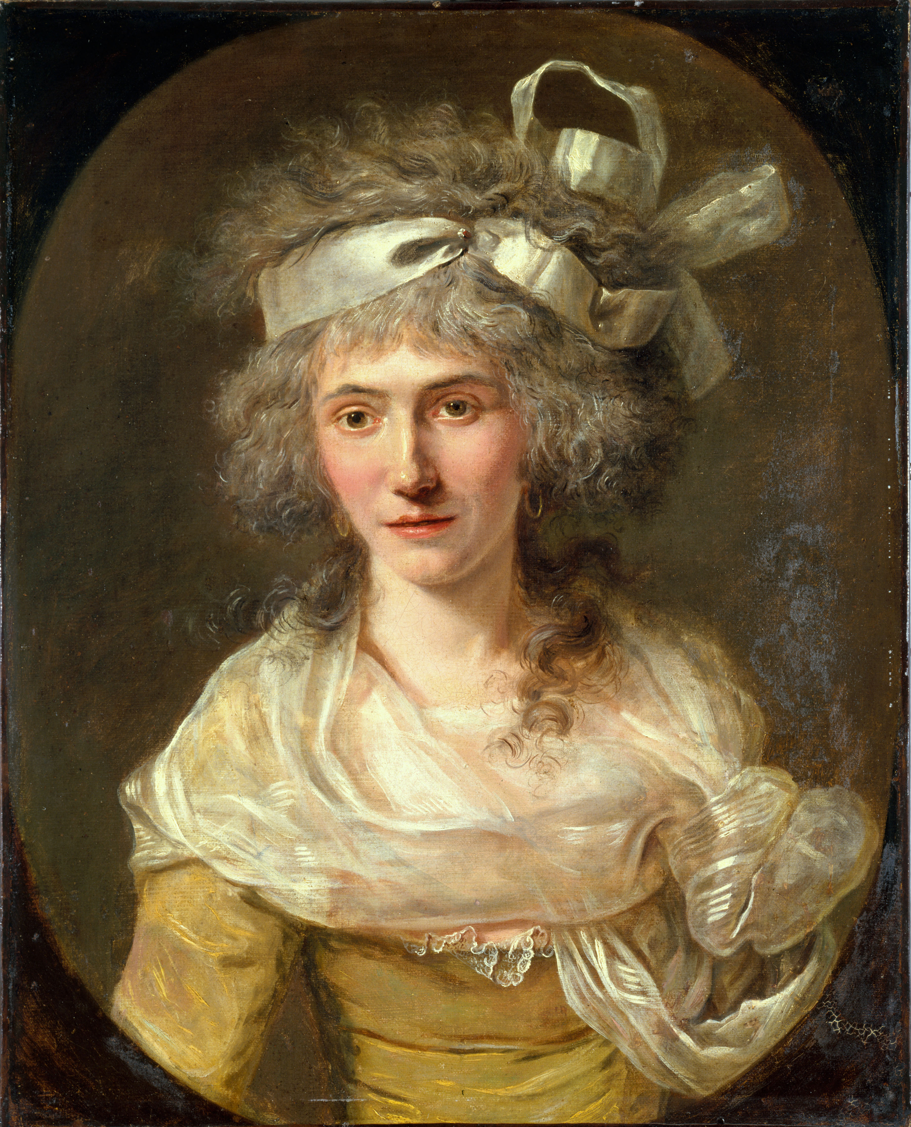 "Portrait de femme (autrefois identifiée comme Anne-Josèphe Théroigne de Méricourt)". Paris, musée Carnavalet.